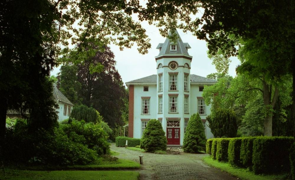 Huis Backenhagen te Deldenerbroek.